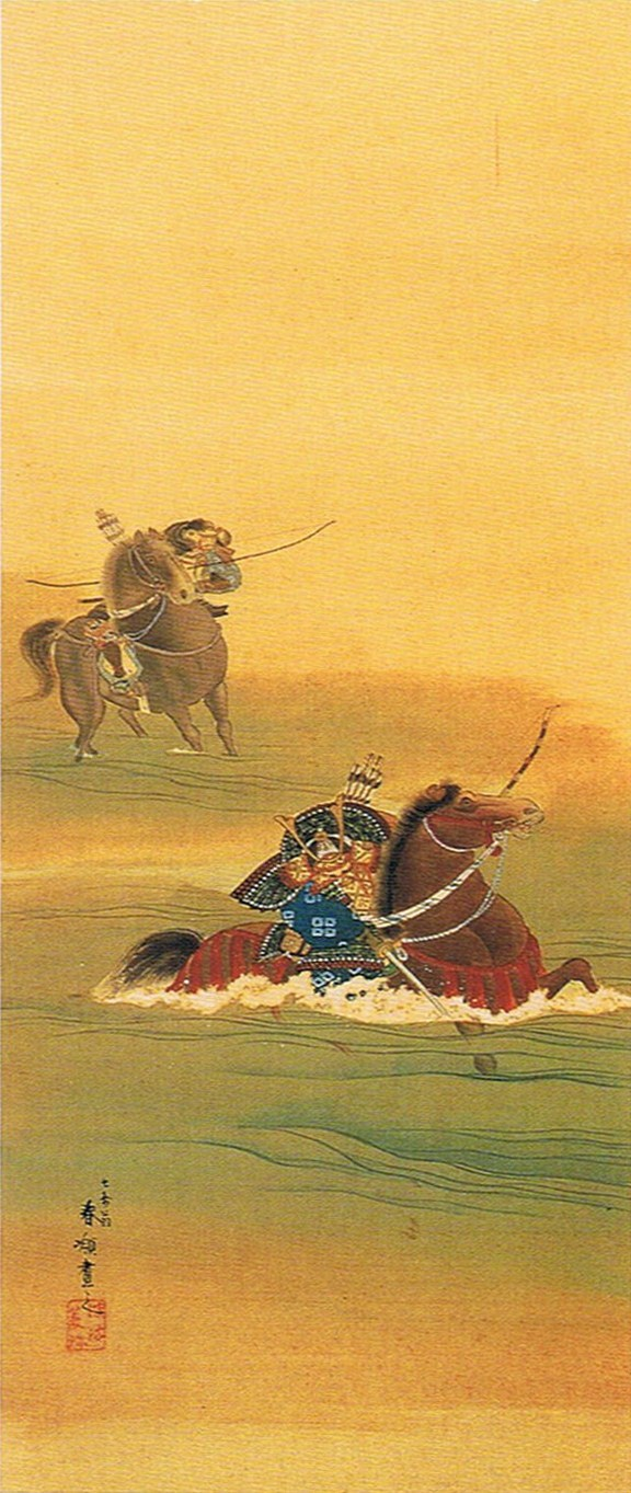 宇治川の先陣争いで梶原景季を虚言で追い越した佐々木高綱が、川底に張られた太綱を切り払いながら対岸に向かう場面。